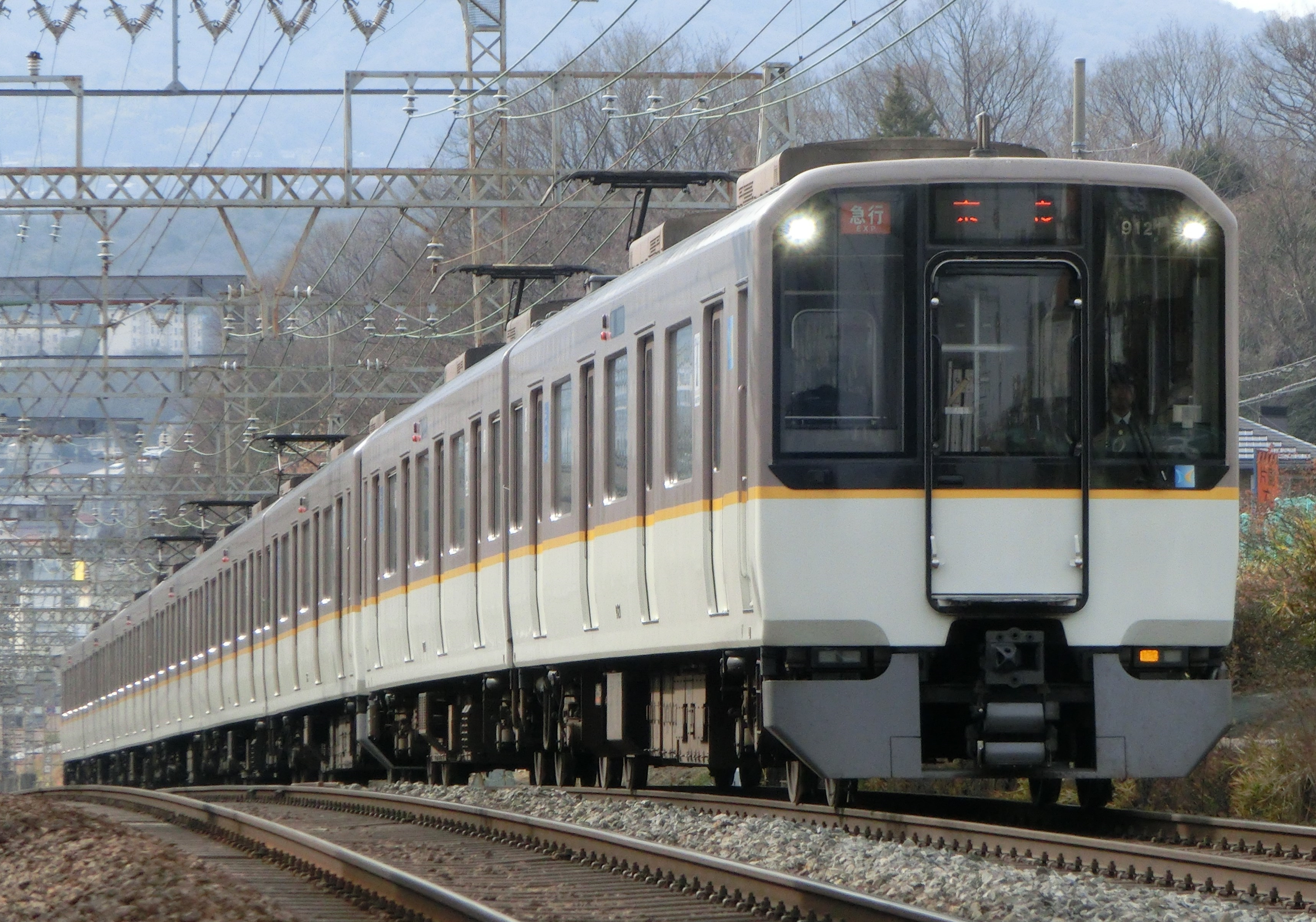 9020系9021F_EE21編成+5800系5823F_DH23編成 撮影：富雄～学園前